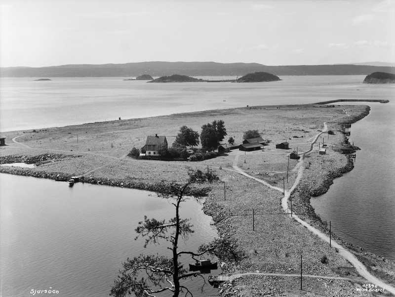 Sjursøya island in Oslo, Norway